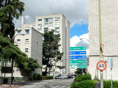 Edificios en la calle de Cebreros, barrio de Lucero, Madrid.